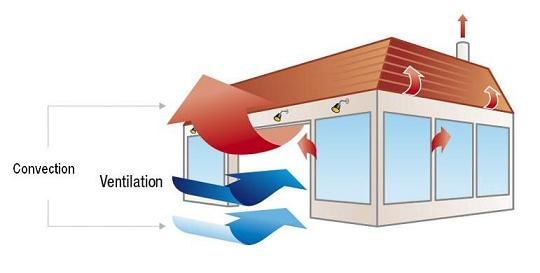 Convection+Ventilation sans rideau d'air au niveau de l'ouverture d'un magasin.